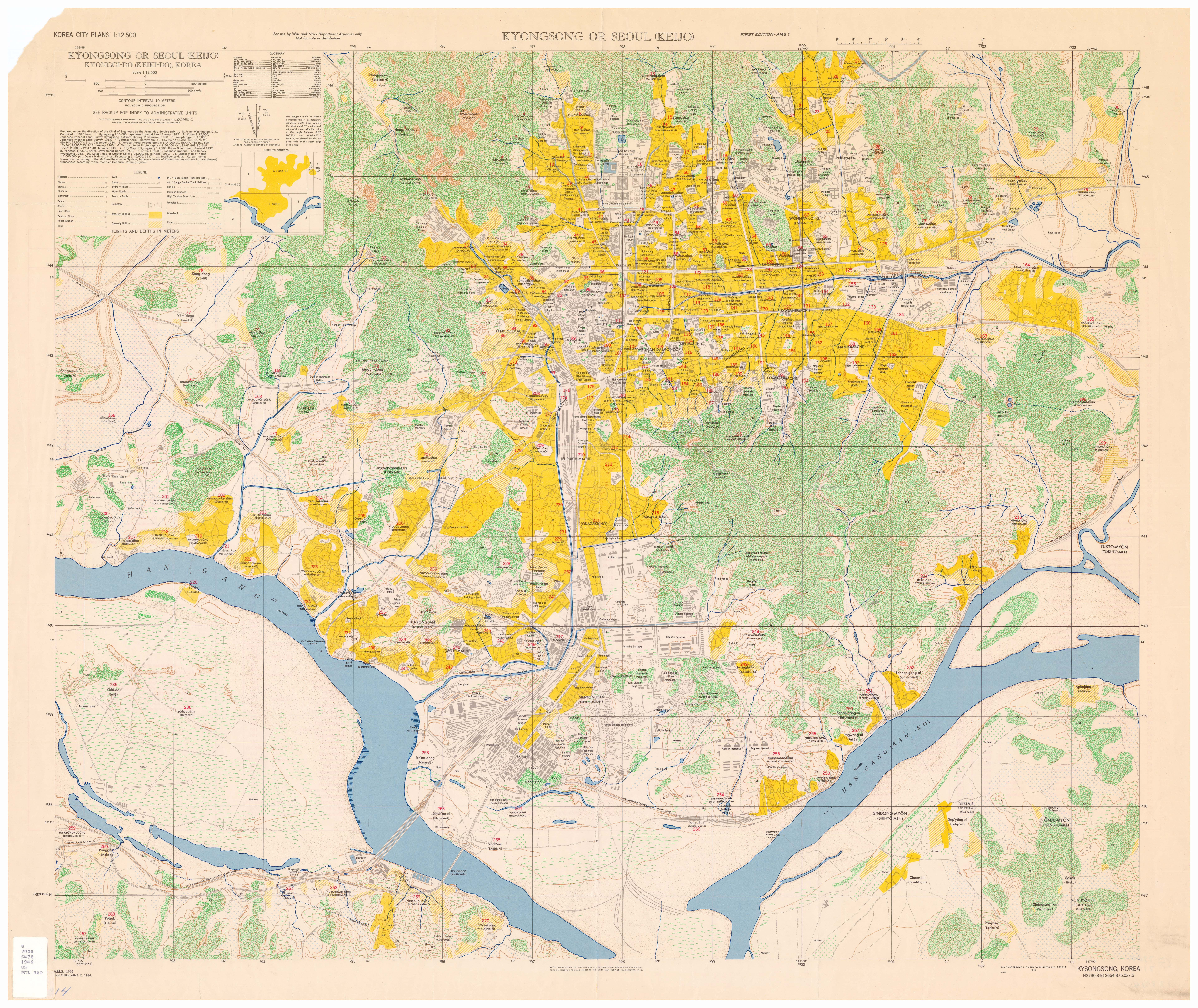 1946년의 서울지도